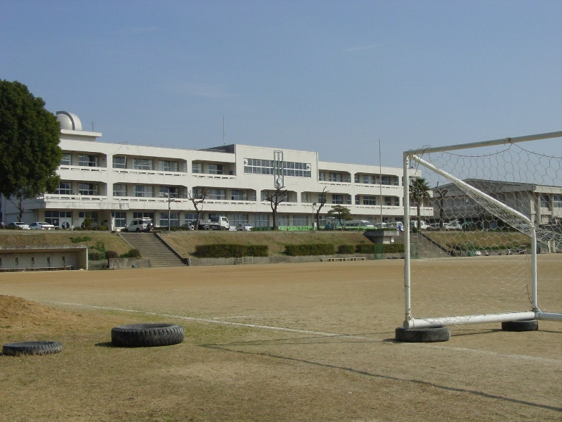 美馬中学校校舎写真